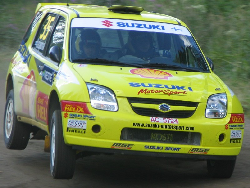 Kosti Katajamäki driving his Suzuki Ignis S1600 at the 2004 Rally Finland.